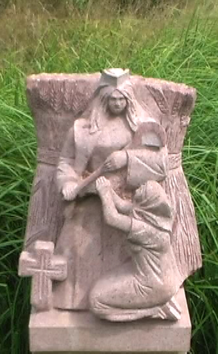 Připołdnica w lěkowanskim a powěsćowym parku, Borkowy (Błóta)